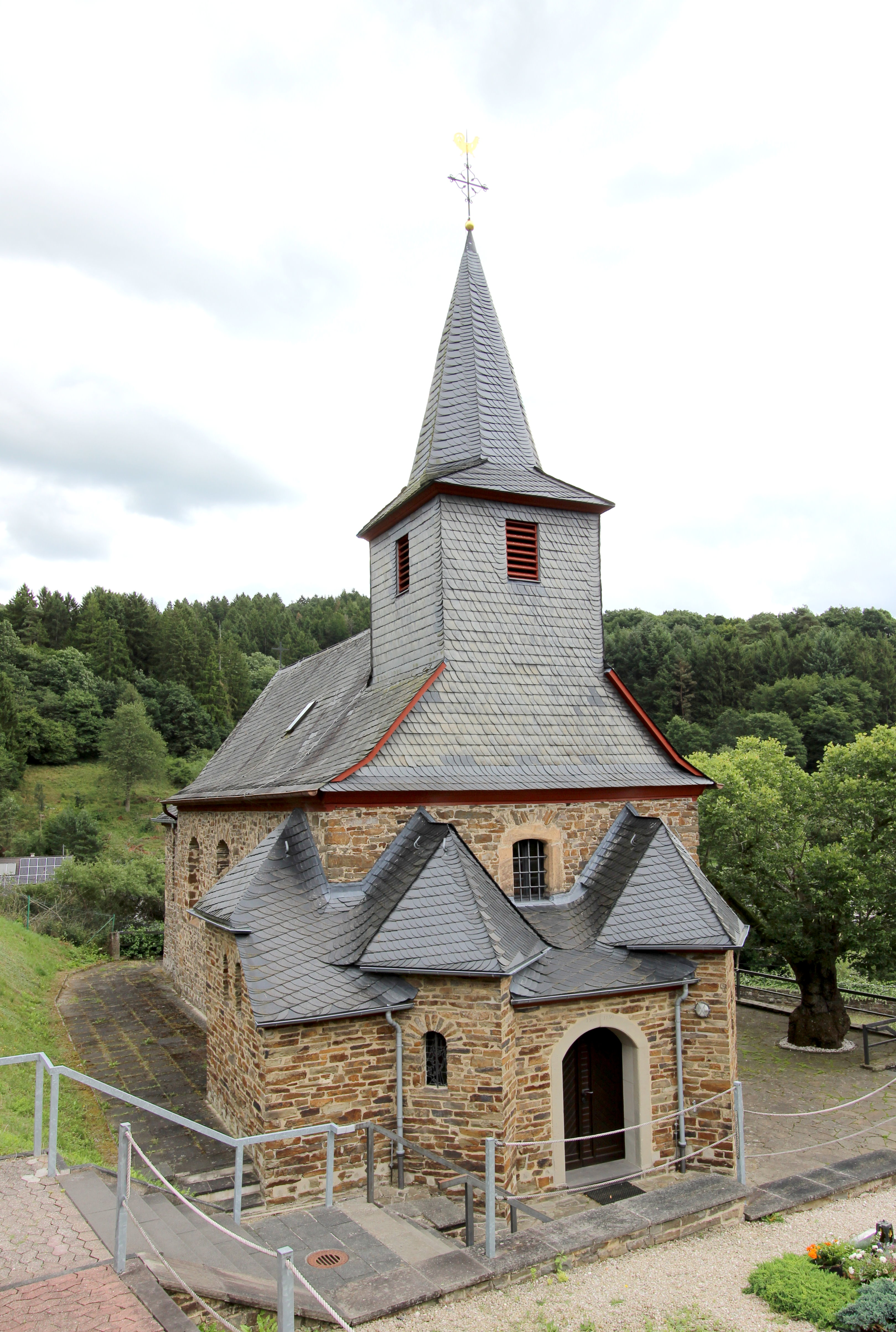 53505 Kirchsahr, Kirchweg. Barocker Saalbau, 1729/30, Sakristeianbau von 1769. Aufnahme von 2017.